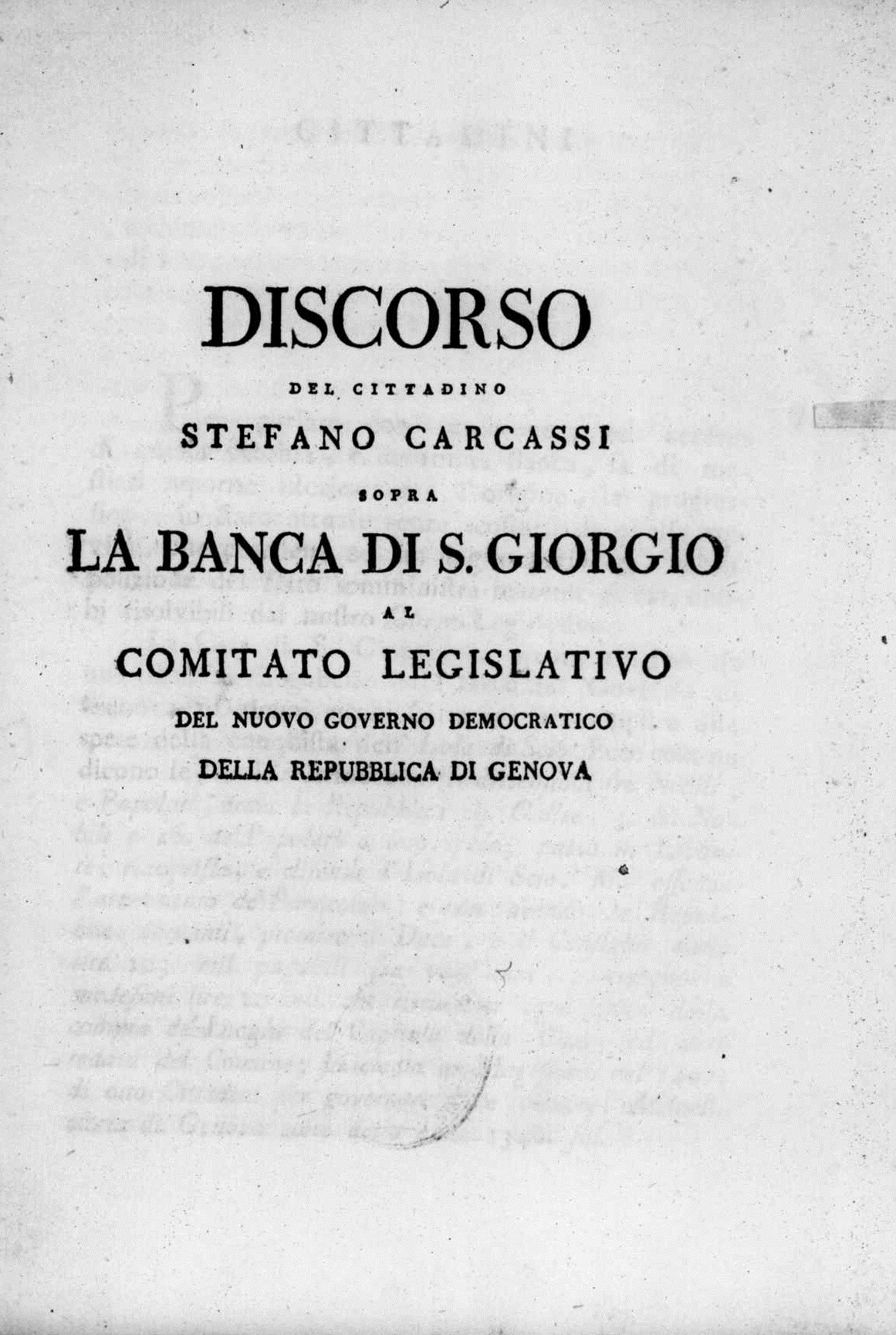 Frontespizio